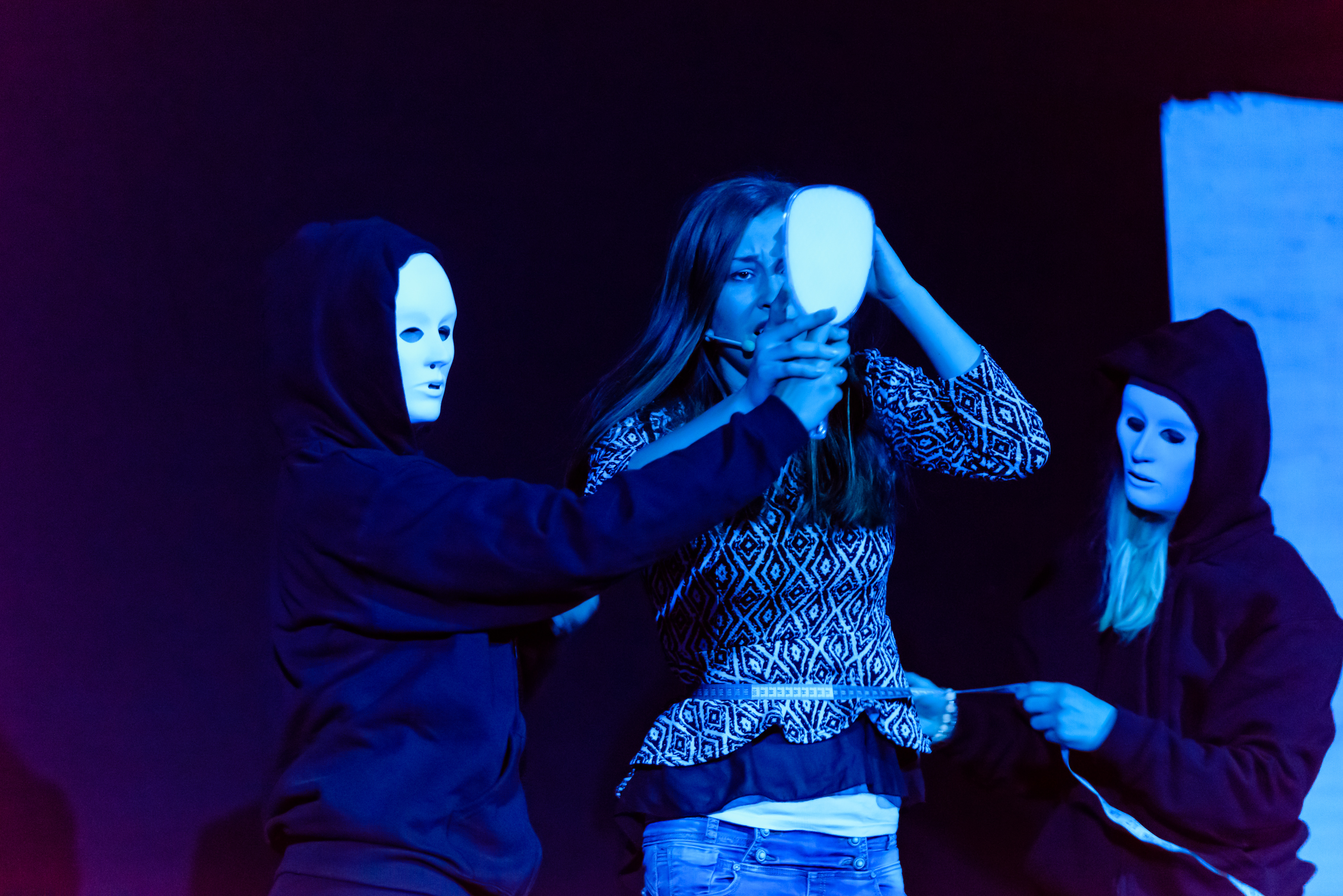 Junge Musicaldarsteller